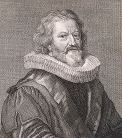 Sujet: De Gerardus Johannes Vossius